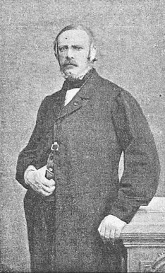 Edouard Thouvenel par Marck